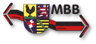 historisches Logo Mieninger Busbetrieb